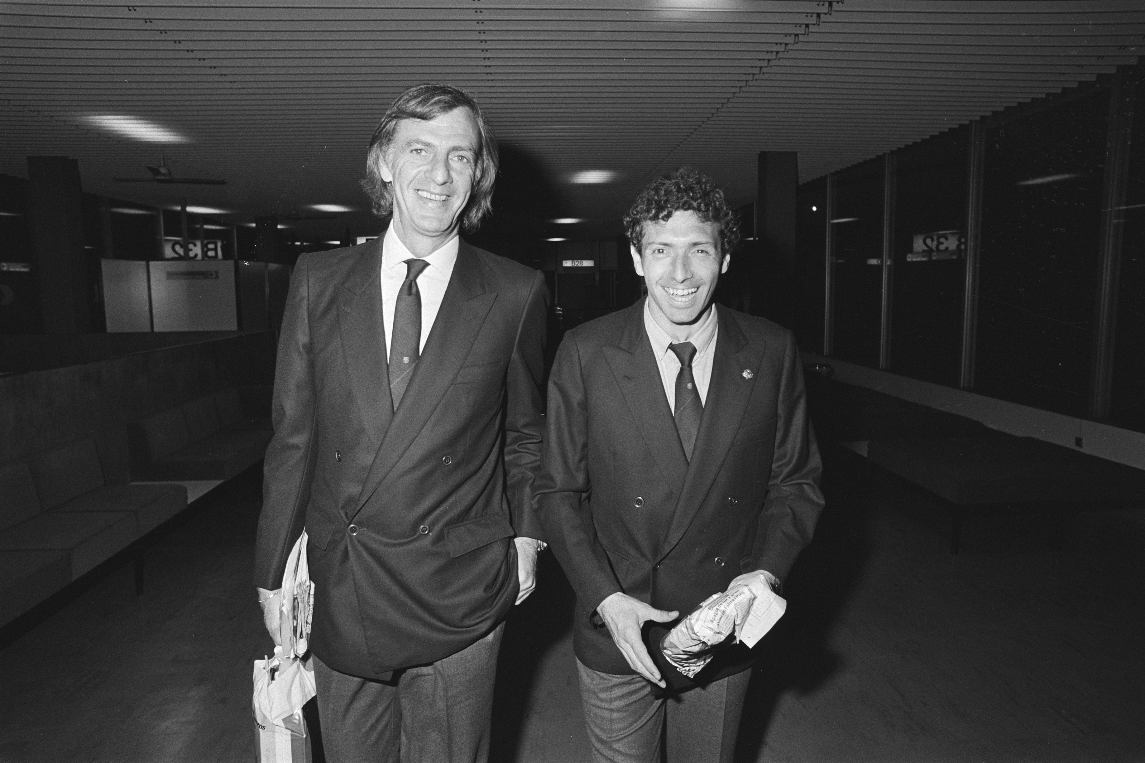 Collectie / Archief : Fotocollectie Anefo Reportage / Serie : Aankomst FC Barcelona op Schiphol in verband met wedstrijd tegen NEC Beschrijving : Trainer Menotti (l) en sterspeler Quini (Enrique Castro González) Datum : 17 oktober 1983 Locatie : Noord-Holland, Schiphol Trefwoorden : aankomst en vertrek, trainers, voetballers Persoonsnaam : Castro, Enrique, Menotti, Cesar Fotograaf : Bogaerts, Rob / Anefo Auteursrechthebbende : Nationaal Archief Materiaalsoort : Negatief (zwart/wit) Nummer archiefinventaris : bekijk toegang 2.24.01.05 Bestanddeelnummer : 932-7345